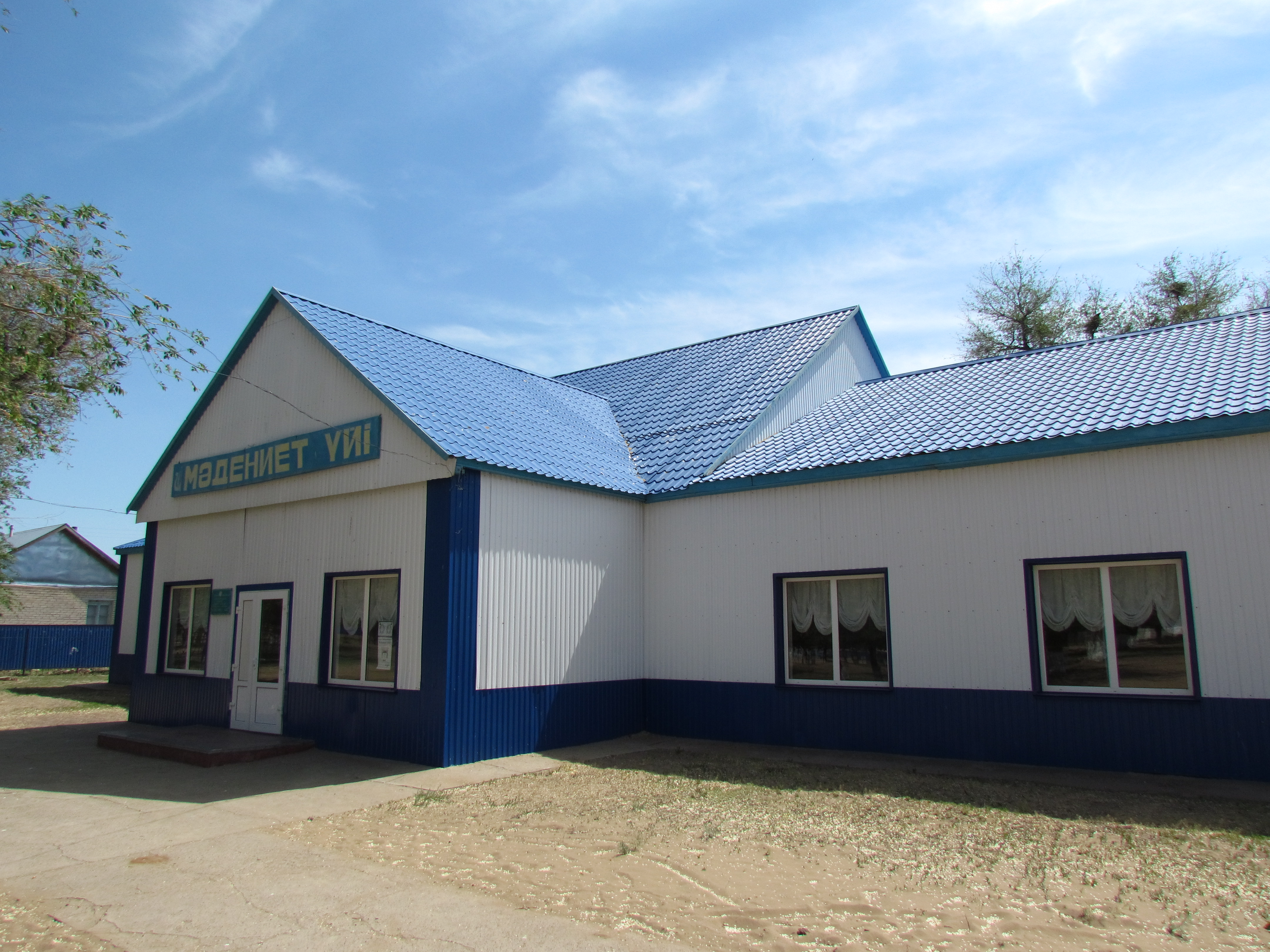 Бұлдырты ауылының мәдениет үйі